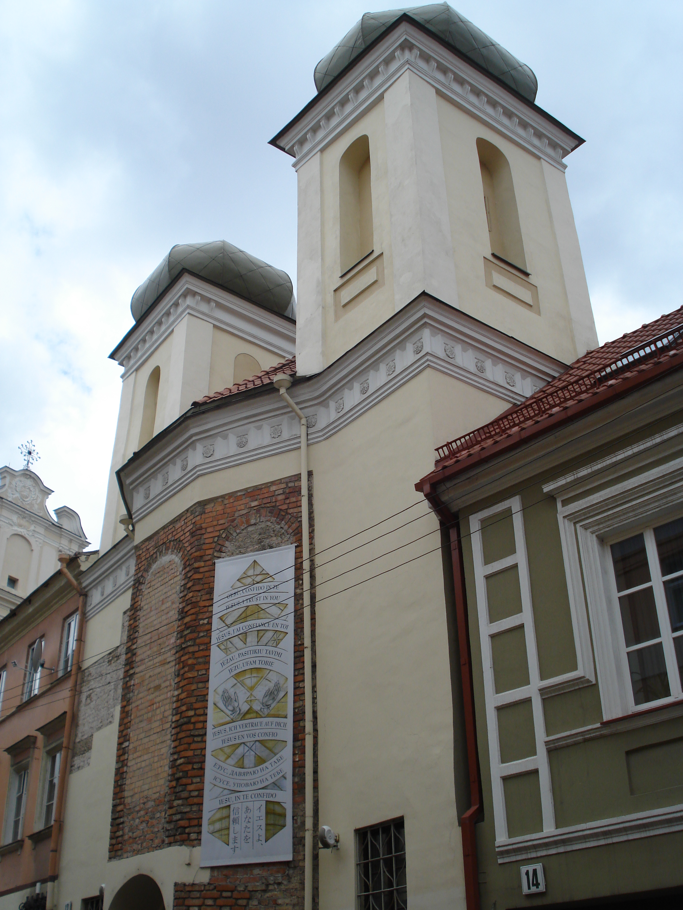 The Divine Mercy Sanctuary in Vilnius (Dievo Gailestingumo šventovė). Dominikonų g. 12